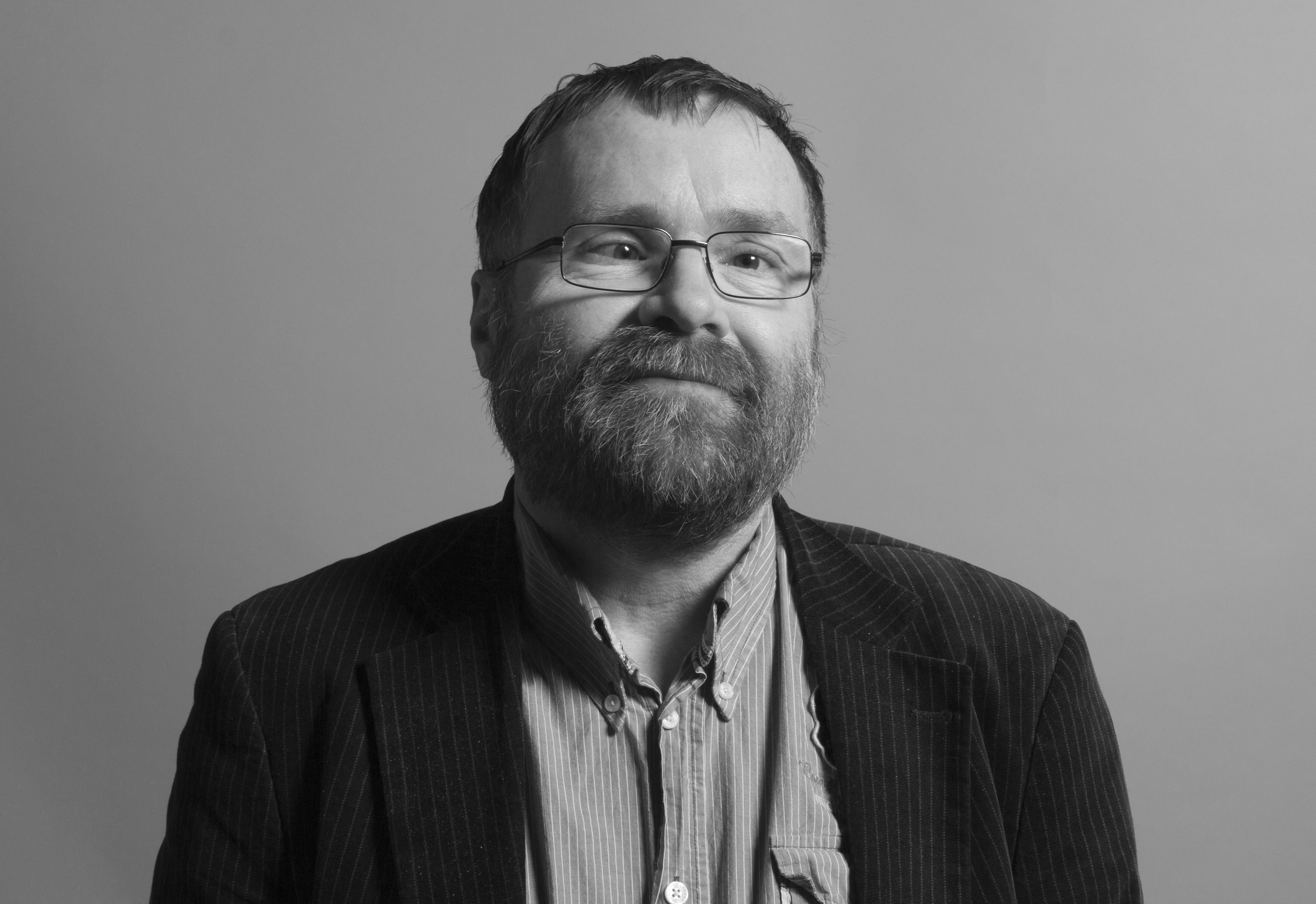 Volker Külow (* 12. November 1960 in Leipzig) ist ein deutscher Politiker (Die Linke). Er ist seit 2004 Mitglied des Sächsischen Landtags. Wikipedia im Landtag – Sachsen 17. bis 18. Dezember 2013 in DresdenDieses Foto wurde im Rahmen des Projektes „Wikipedia im Landtag“ erstellt. Fragen zur Nachnutzung Wenn Sie Fragen zur Nachnutzung dieses Bildes haben, können Sie sich jederzeit gern an wenden